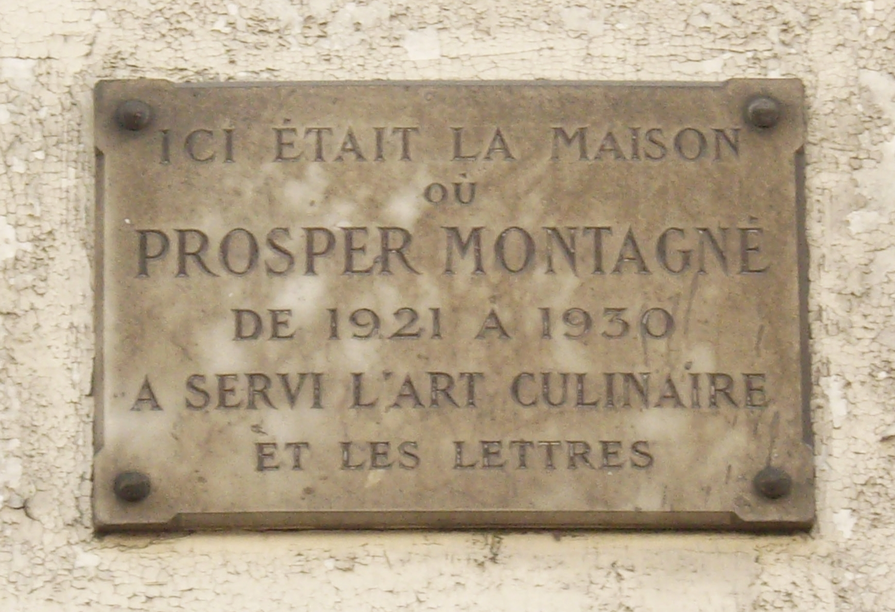 Plaque apposée au n° 5 de la rue de l'Échelle, Paris 1er. « Ici était la maison où Prosper Montagné de 1921 à 1930 a servi l'art culinaire et les lettres. »